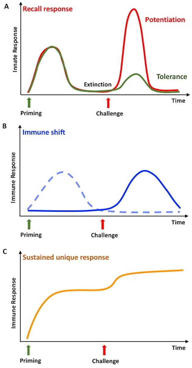 Figure 1. Innate memory in invertebrates and vertebrates. (A) Infections or stressors can prime the innate immune system so that, after a phase of extinction of the response, it will respond more potently to a subsequent challenge with the same or a different stimulus. In invertebrates, this is defined as a recall response, while in vertebrates it is called potentiation or trained immunity (red line). Only in vertebrates, the secondary response can be less intense than the first one, a phenomenon known as tolerance (green line). (B) In invertebrates, a second challenge in primed animals can lead to an immune shift, i.e., the shift from a type of response (dotted line) to a different, more efficient one (solid line). (C) In invertebrates, priming could result in a medium- or long-term immune activation state, which can further increase upon challenge. This is identified as sustained or unique response. Adapted from Coustau et al. (48) and Pradeu and Du Pasquier (15).